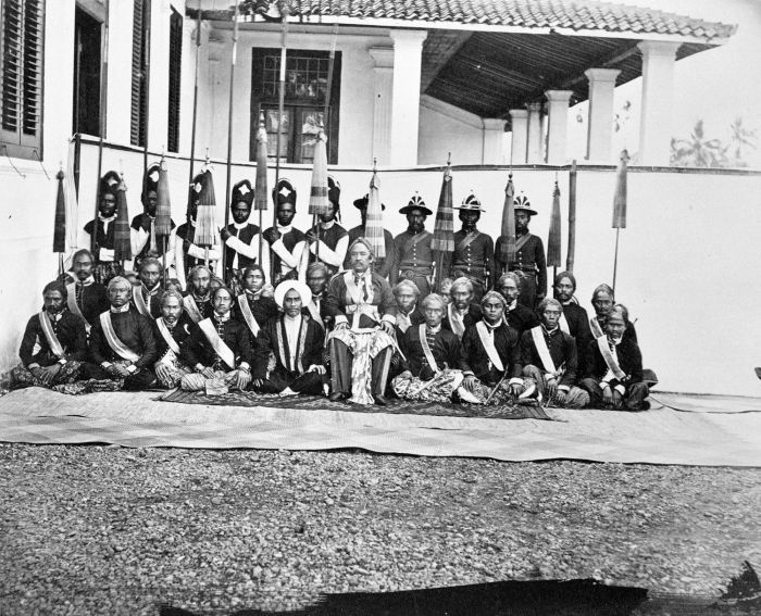 Foto. De regent van Bandoeng met zijn gevolg.